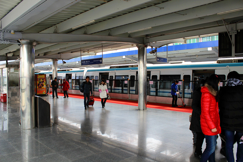 中文（中国大陆）: 武汉地铁1号线